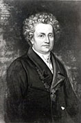 Josef von Teng (1786-1837)